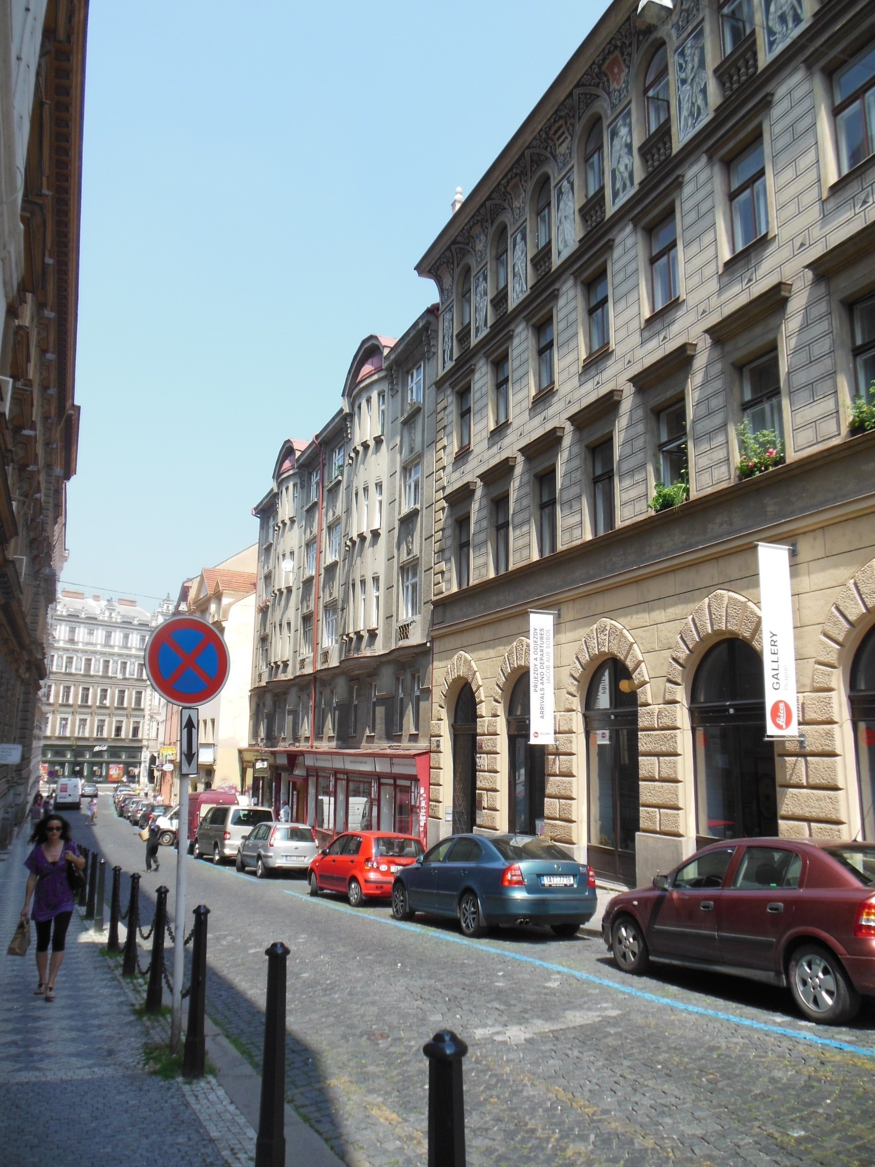 Ulice Školská na Novém Městě v Praze. V pozadí ulice Vodičkova.